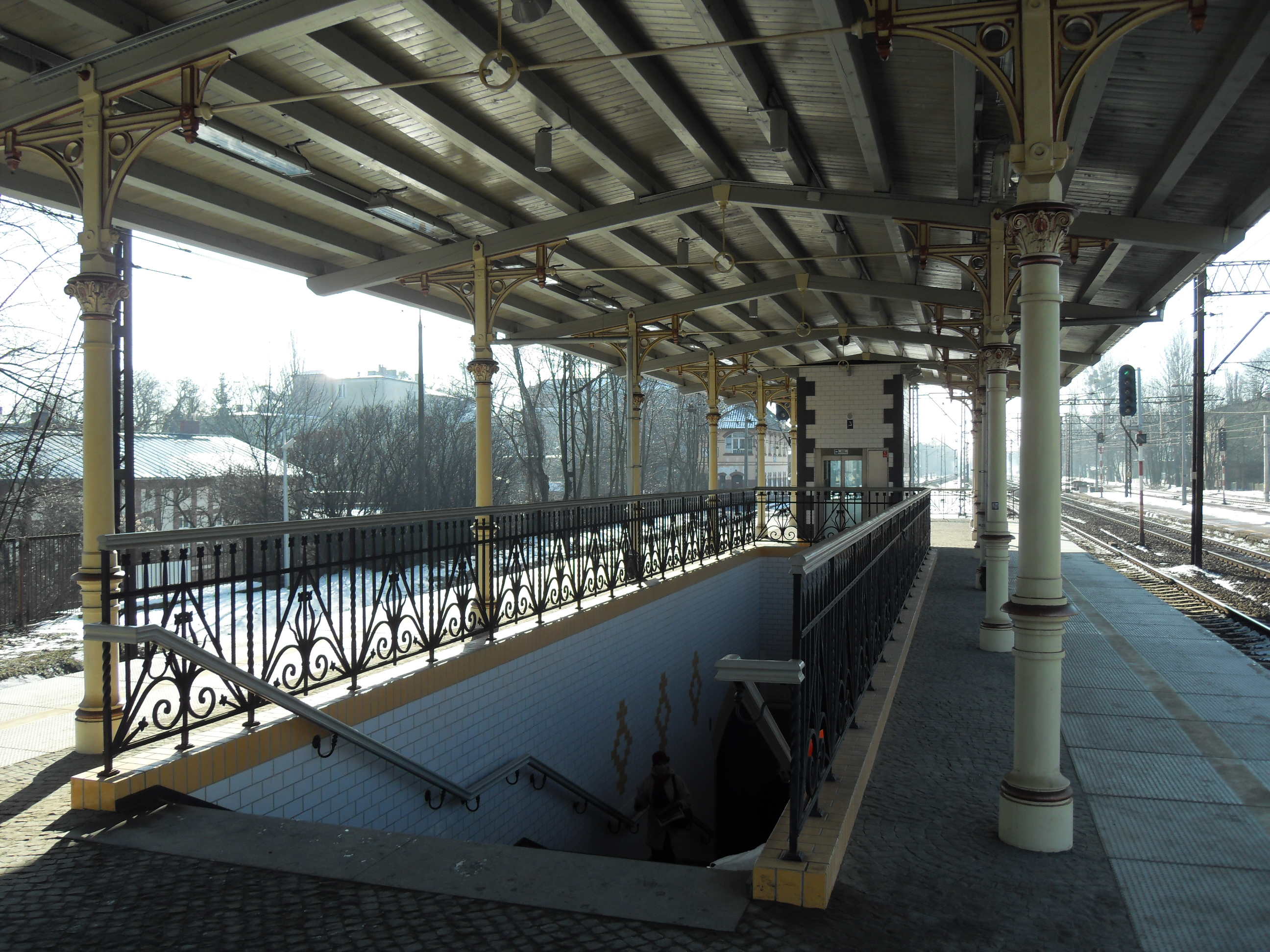 Peron SKM (podmiejski) w Sopocie, po renowacji (widok w kierunku Gdańska).